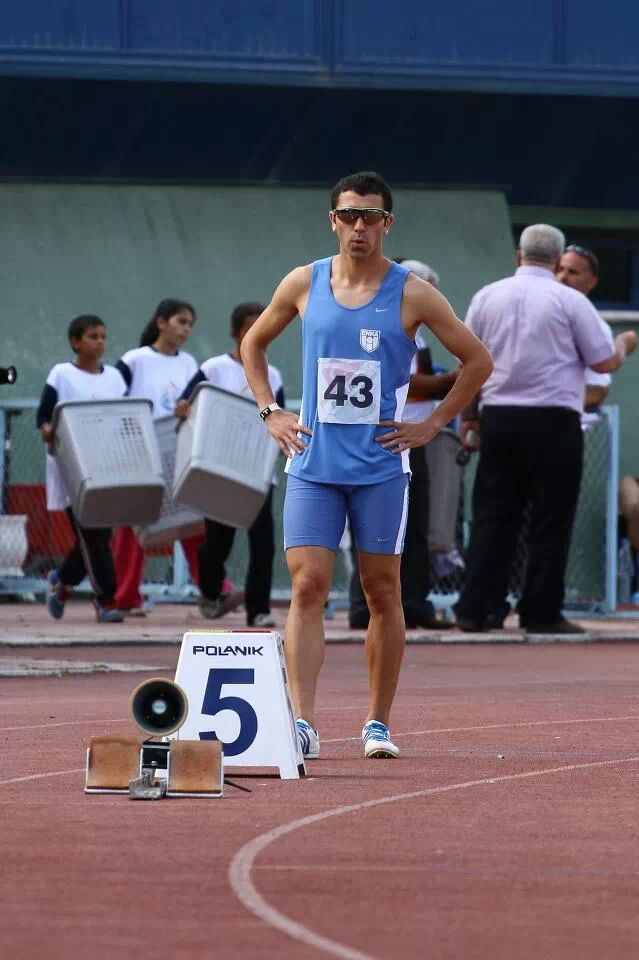 Super lig kademesi 2012 ankara